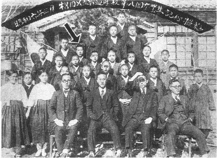 대한민국의 기업인 정주영의 소학교 졸업 사진